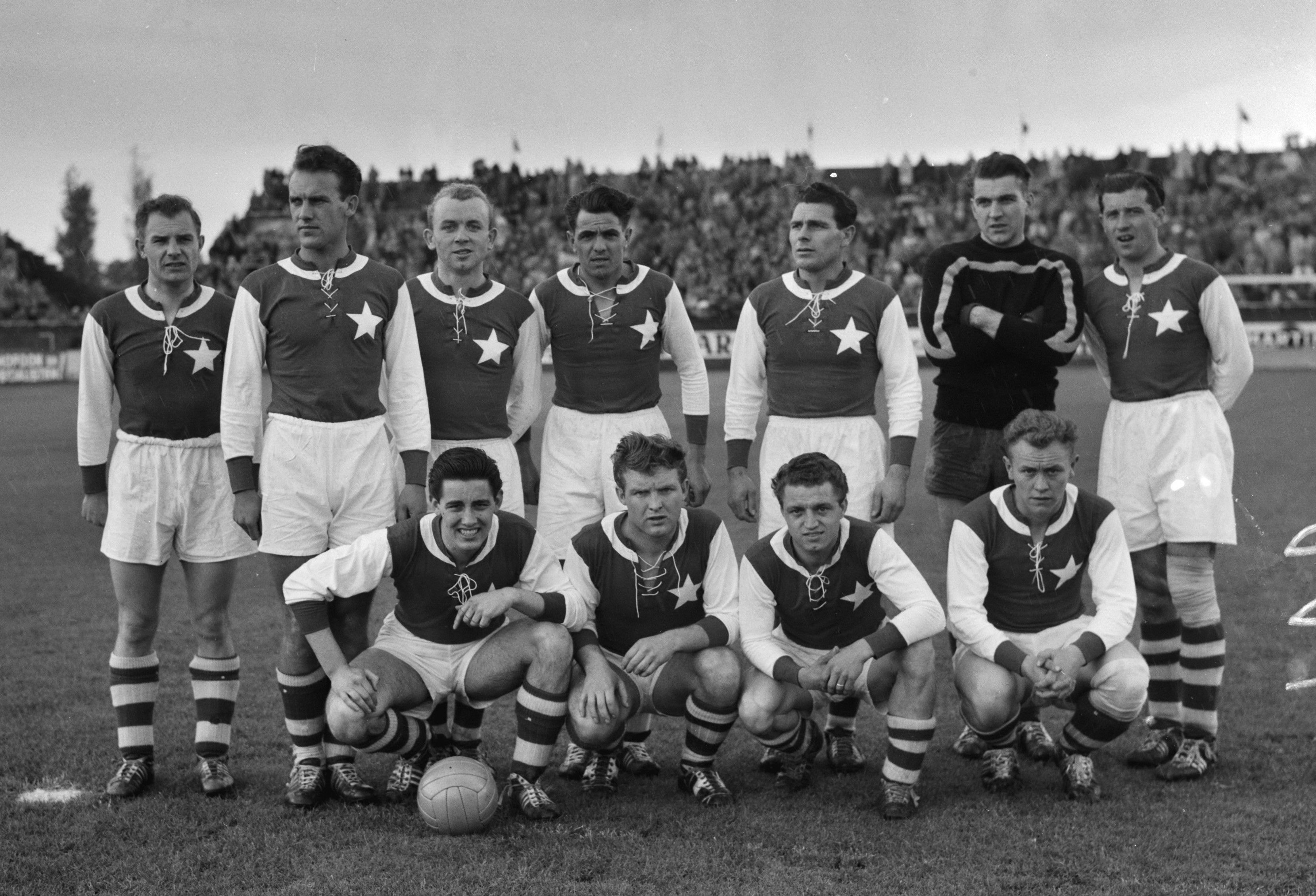 MVV Maastricht tegen Ajax. MVV Maastricht elftal.